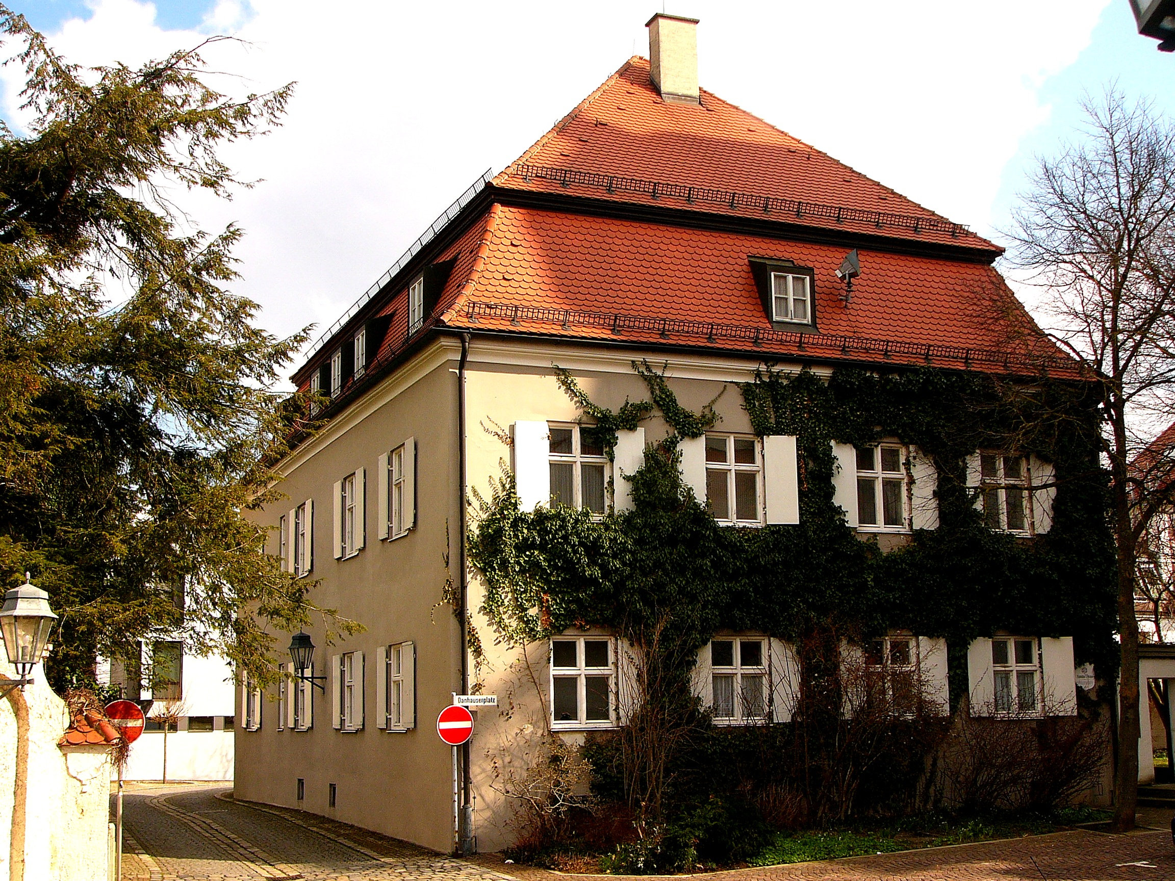 Pfarrhaus; stattlicher zweigeschossiger Bau mit Mansardwalmdach, 1756.This is a photograph of an architectural monument.